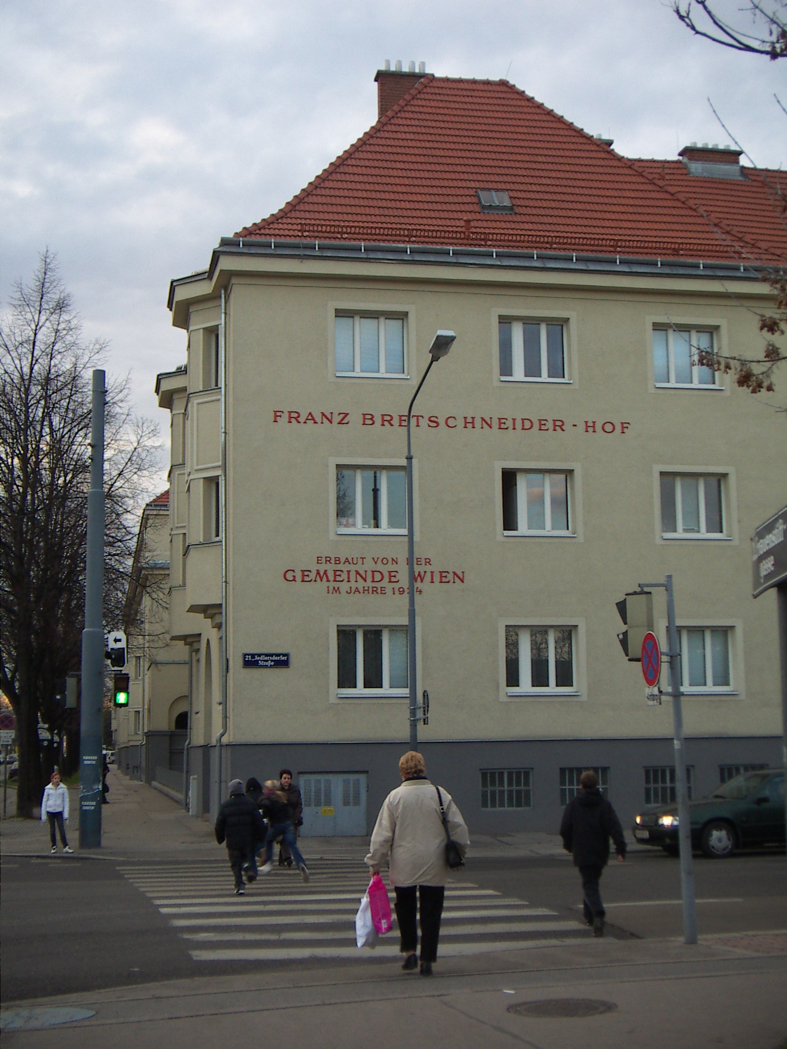 Franz-Bretschneider-Hof, benannt nach Franz Bretschneider in Floridsdorf This media shows the Vienna residential building (Gemeindebau) with the ID 238.